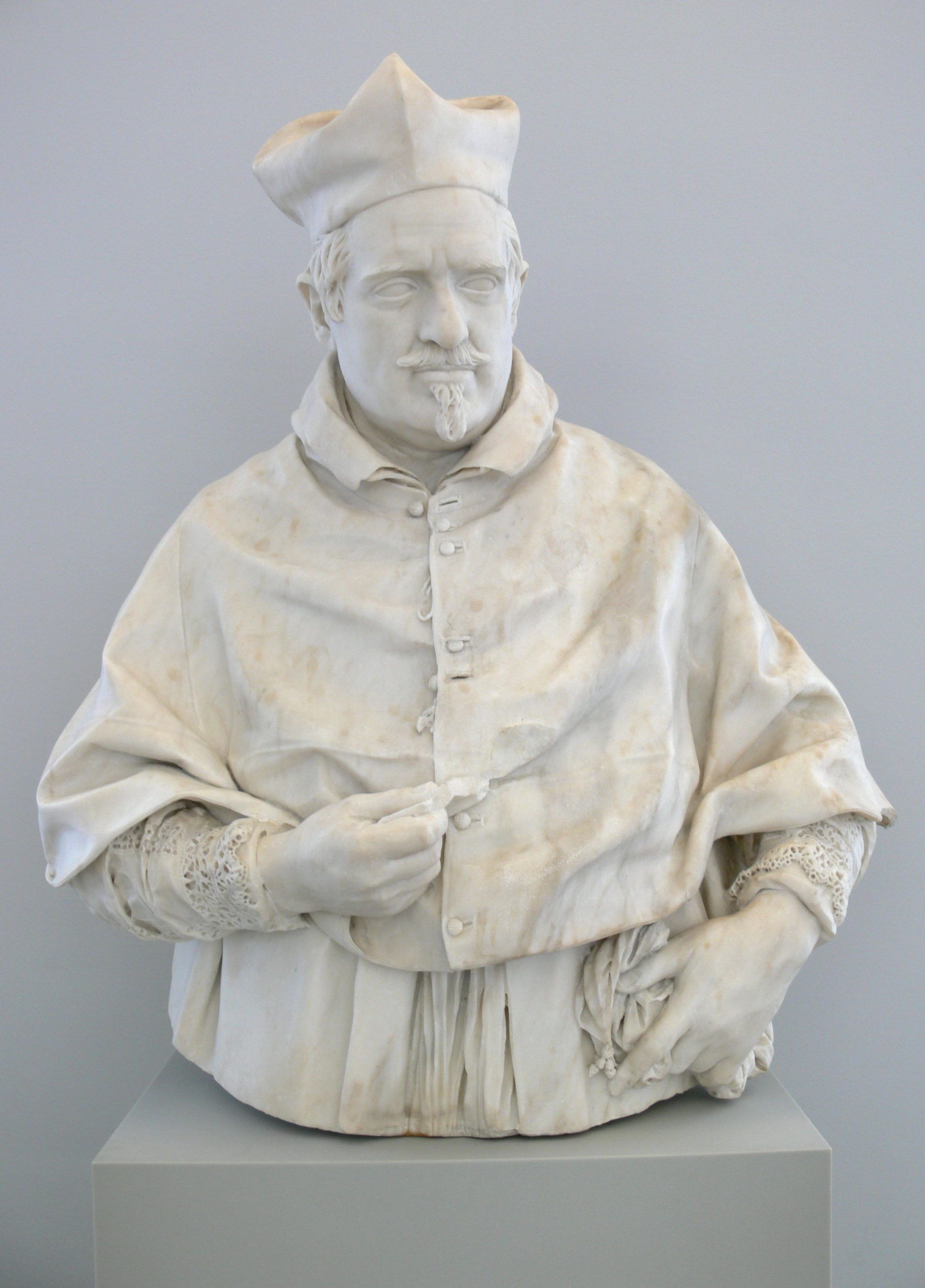 (erworben 1786 für das Berliner Schloss)